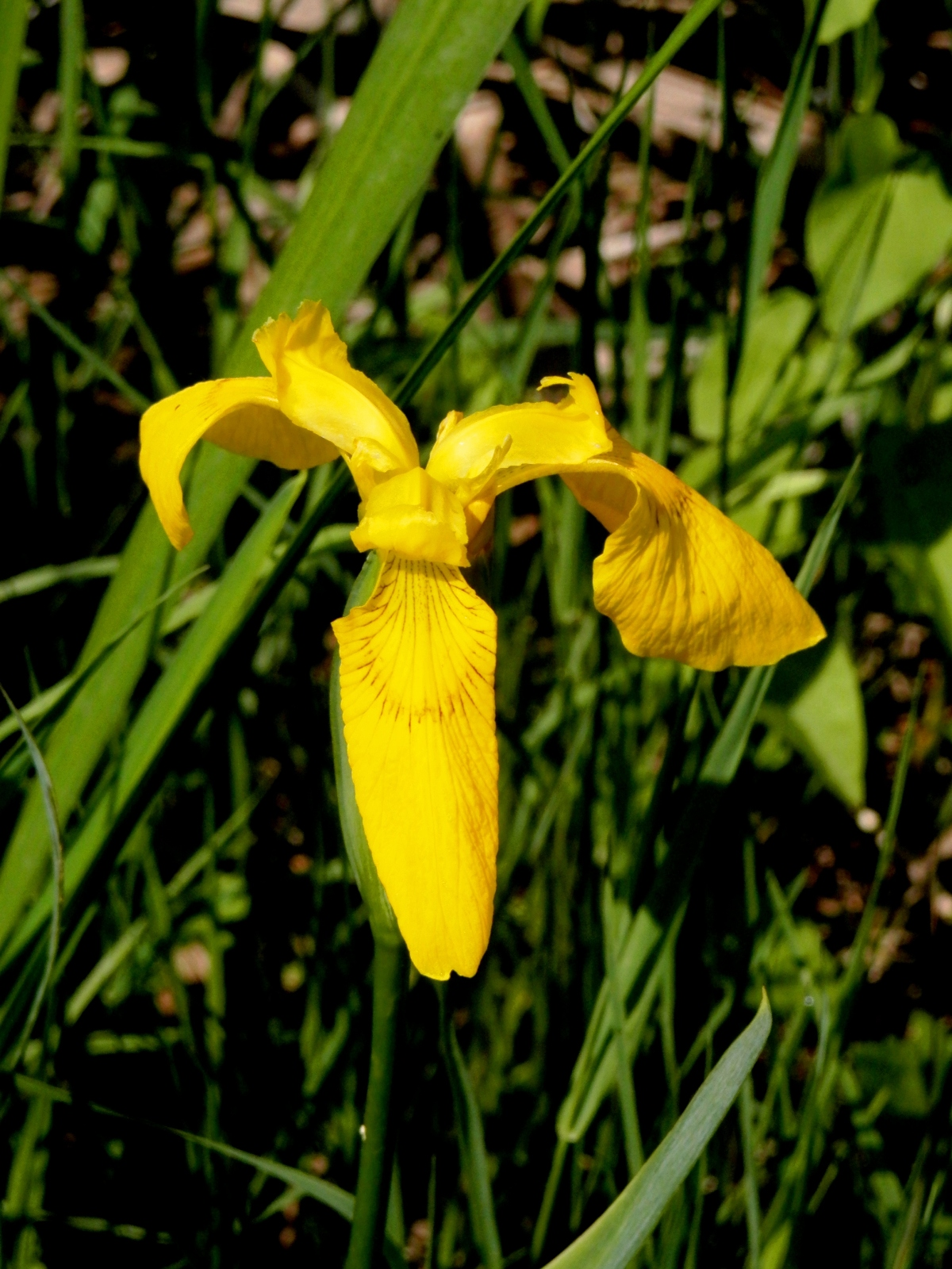 Устие на река Велека, Блатна перуника (Iris pseudacorus)